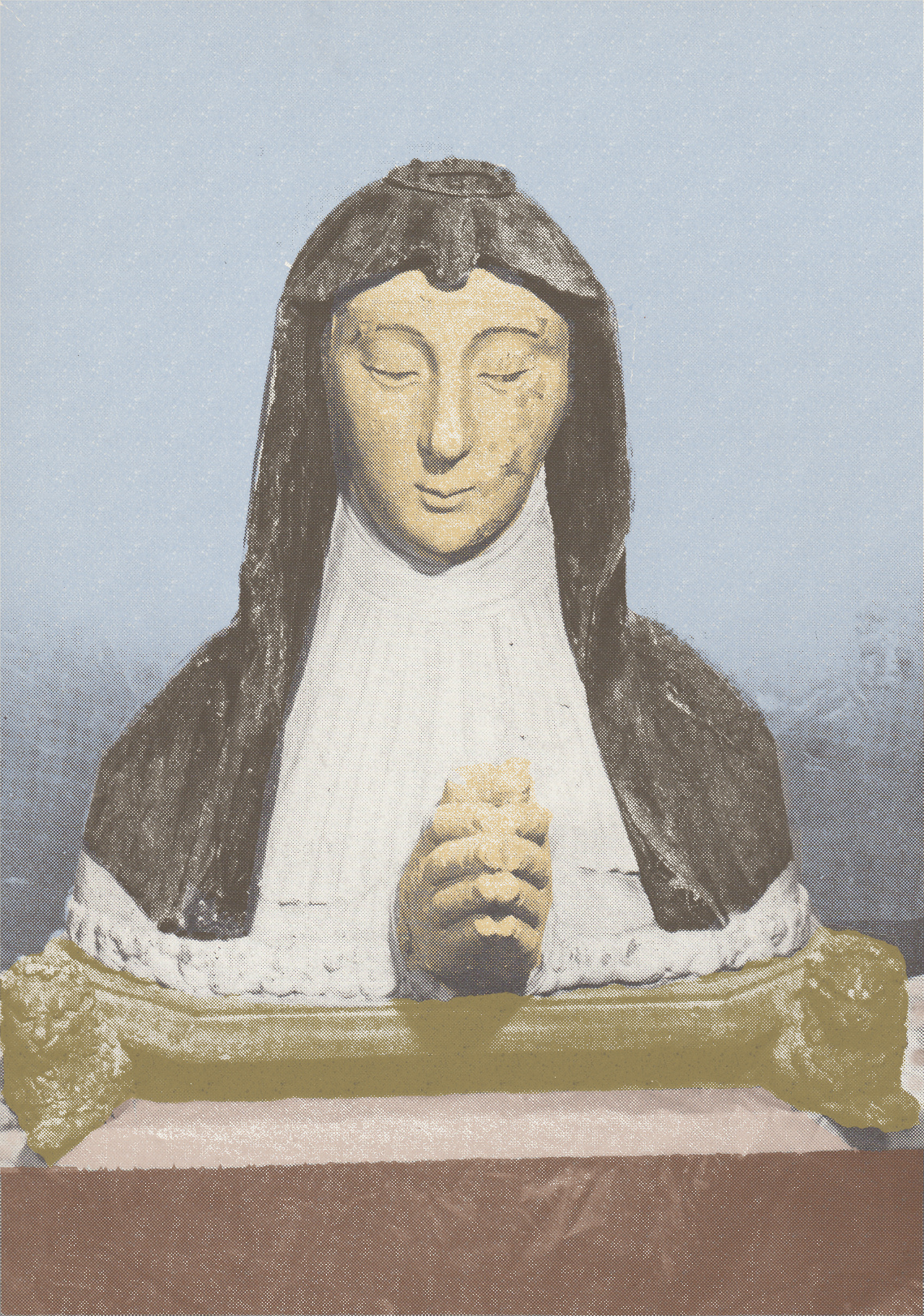 Image colorisée : reliquaire d'une prieure de Fontaines-les-Nonnes dans l'église de Douy-la-Ramée